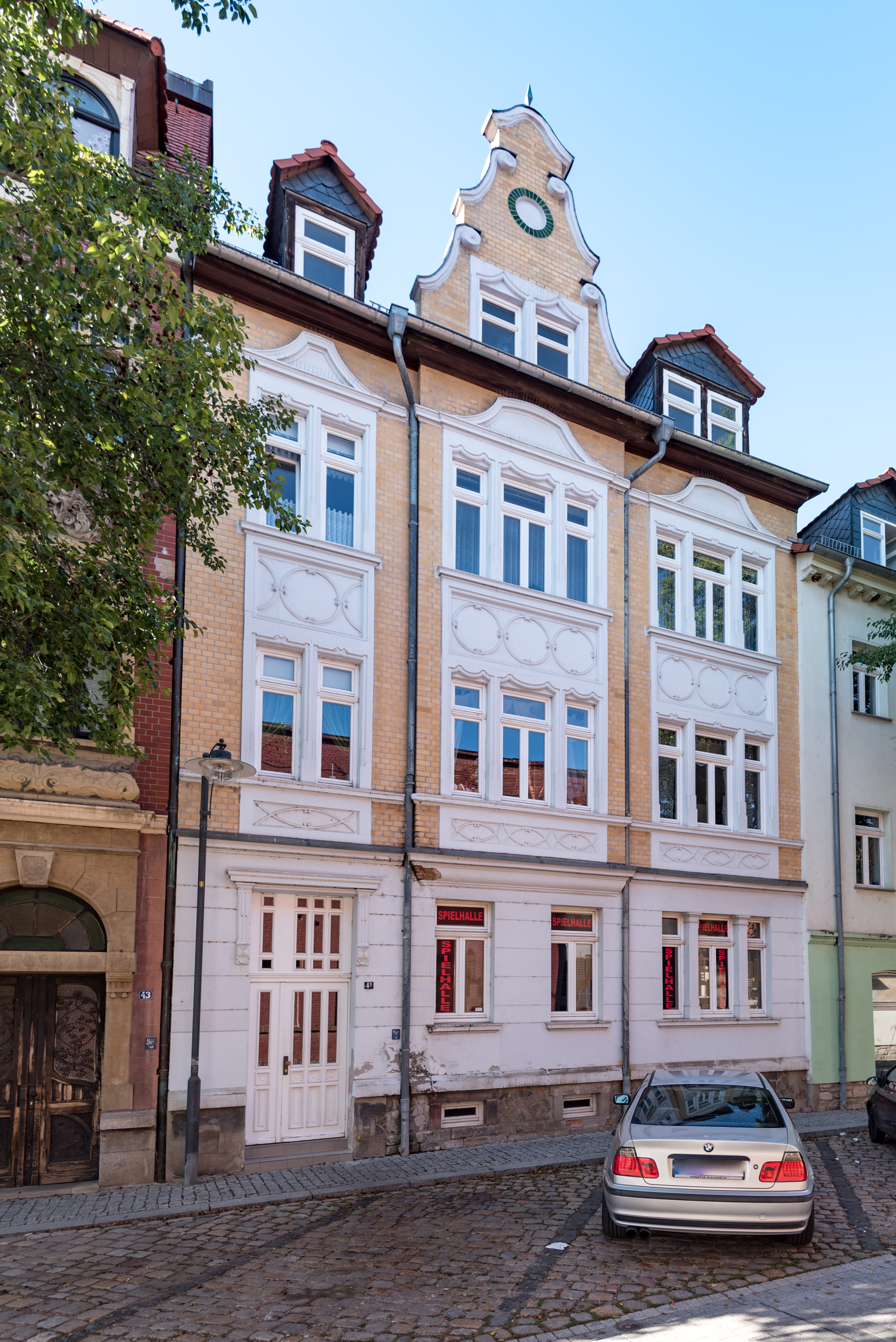 Weißenfels, Große Kalandstraße 41